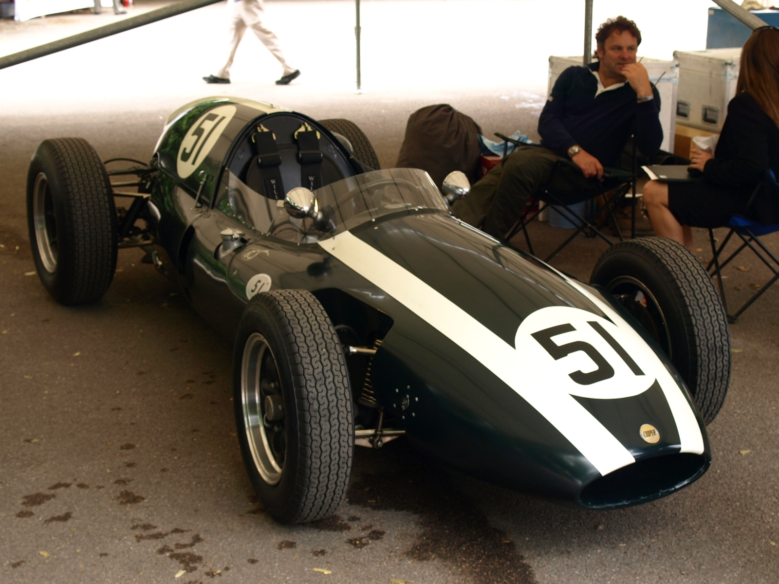 Cooper